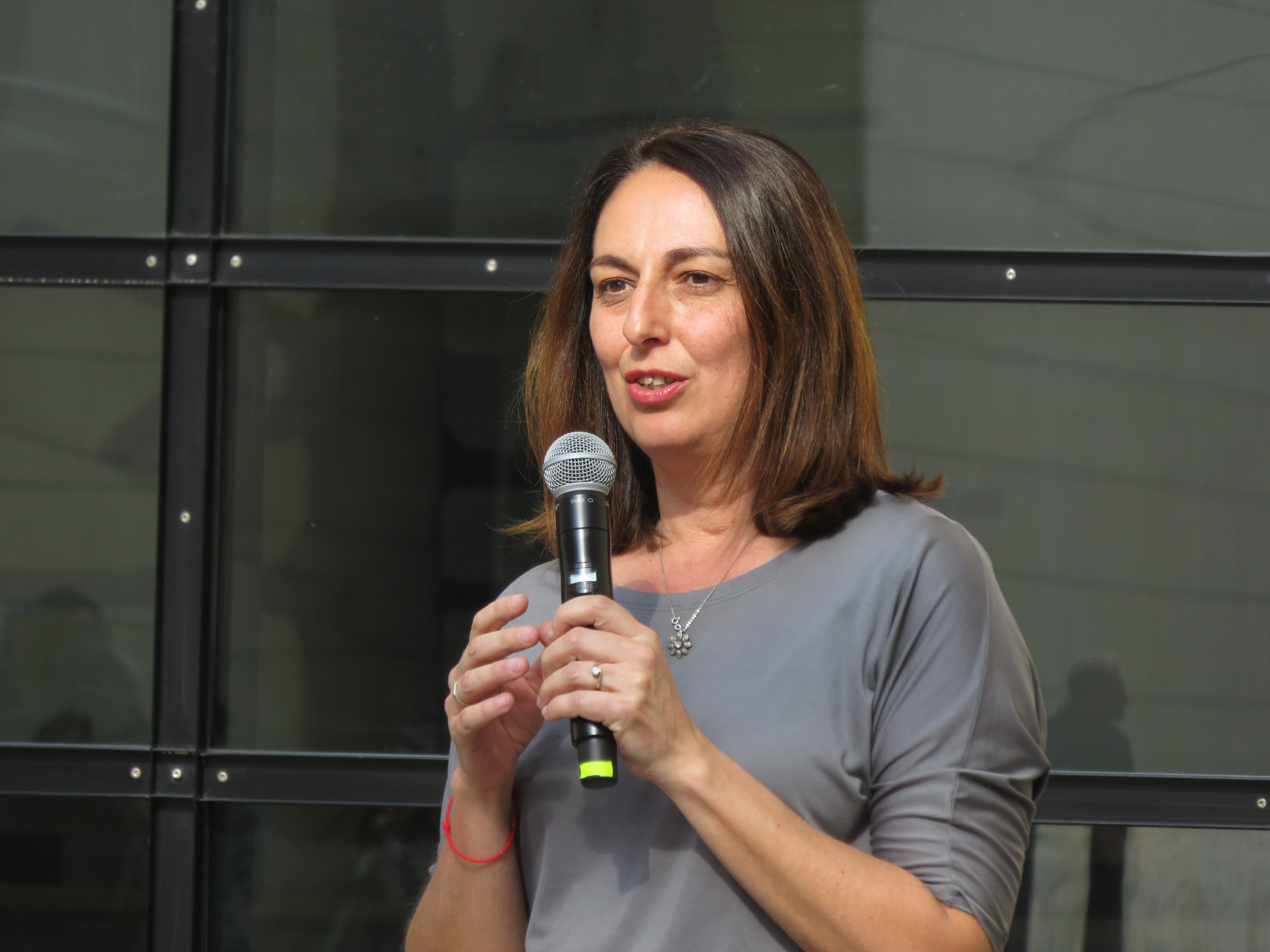 Presentazione il giorno 21 maggio 2018 sotto la cupola del Mart delle iniziative culturali dei tre musei a Rovereto per la tappa del Giro d’Italia del giorno successivo